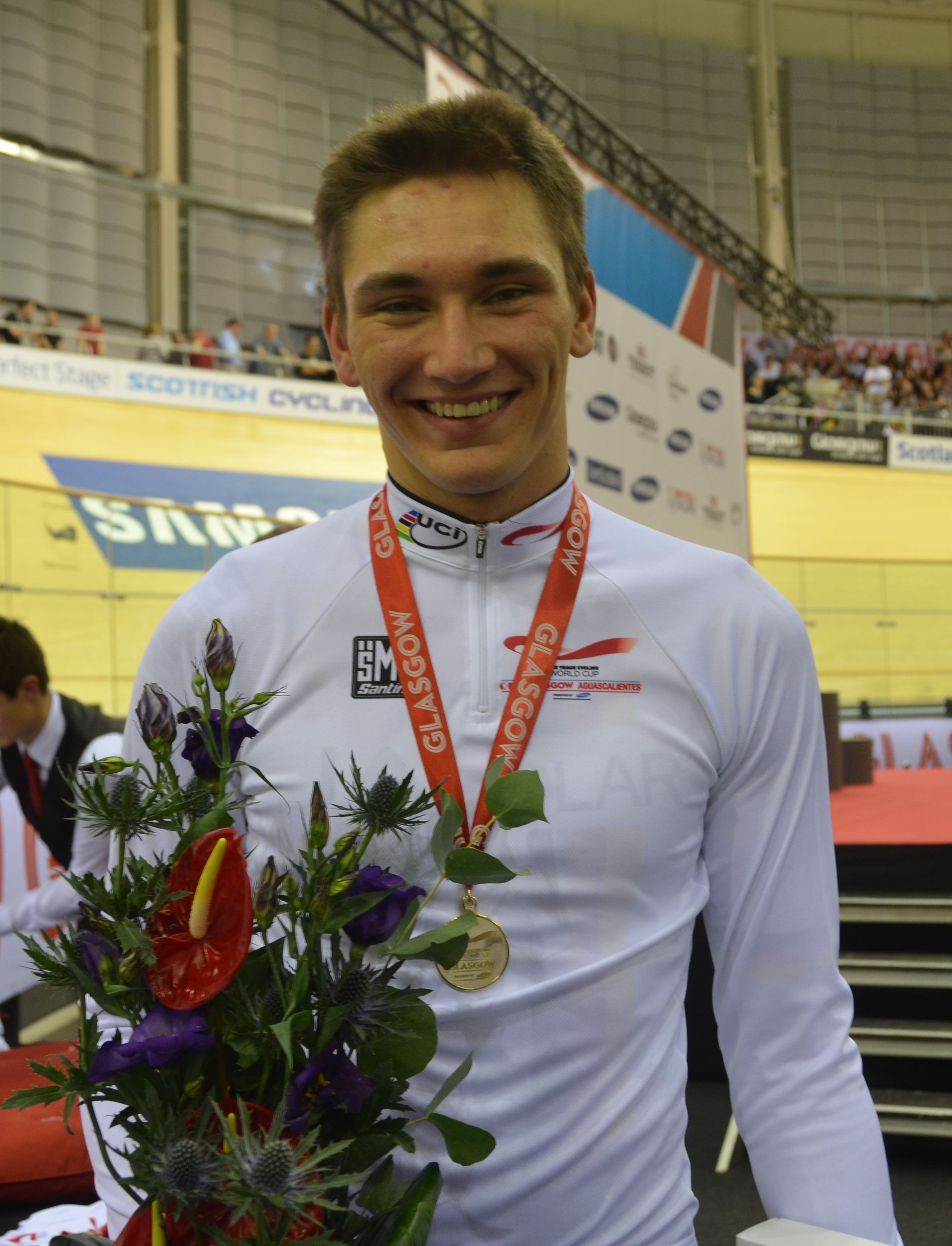 Bahnrad-Weltcup 2012, Lucas Liss: Sieger im Omnium